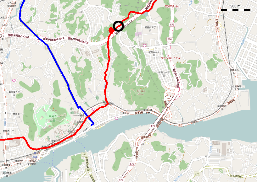 2015年の尾道周辺地図に近世の街道を示したもの。赤が西国街道、青が出雲街道、黒が坊地峠 This map may be incomplete, and may contain errors. Don't rely solely on it for navigation.